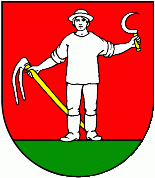 герб с. Чергов: герб села